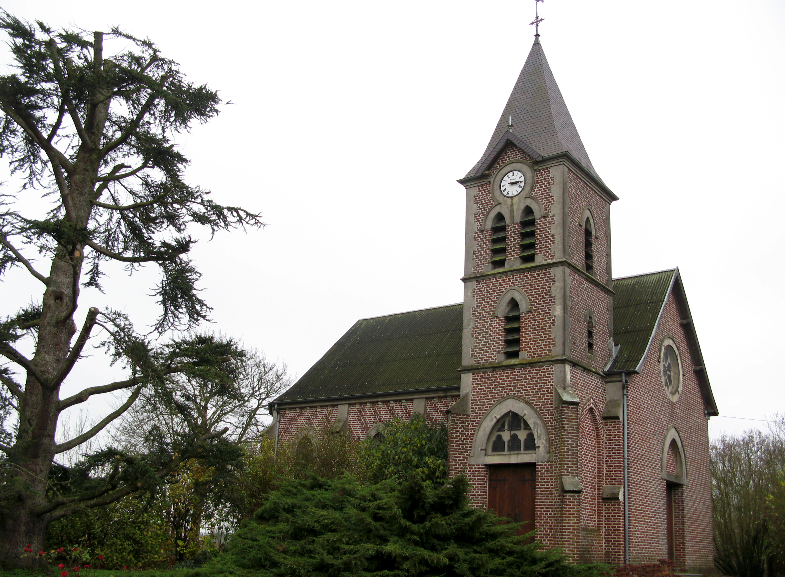 Léchelle (Pas-de-Calais, France) - L'église. .